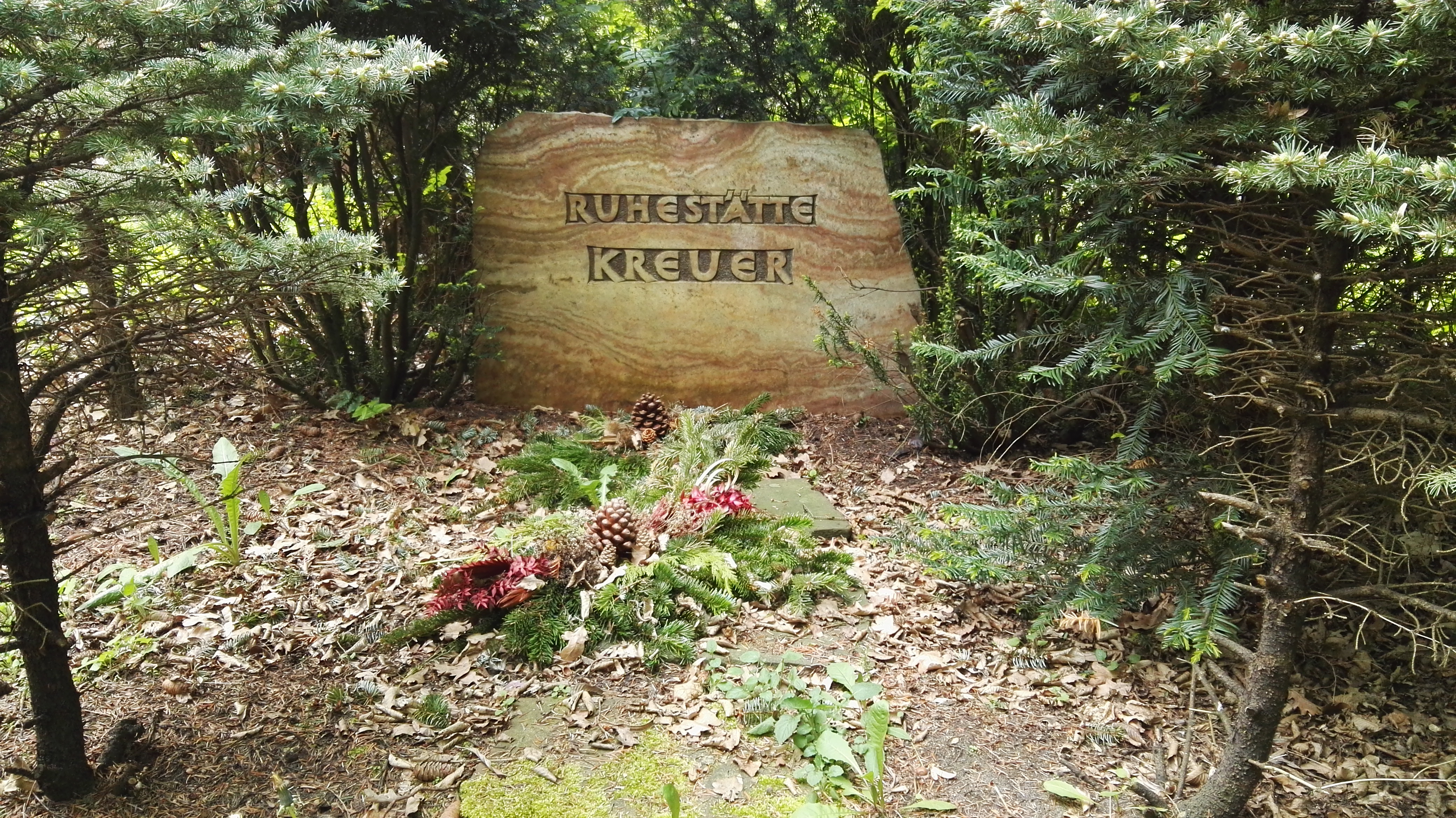 Grab von Willy Kreuer auf dem Heidefriedhof in Berlin